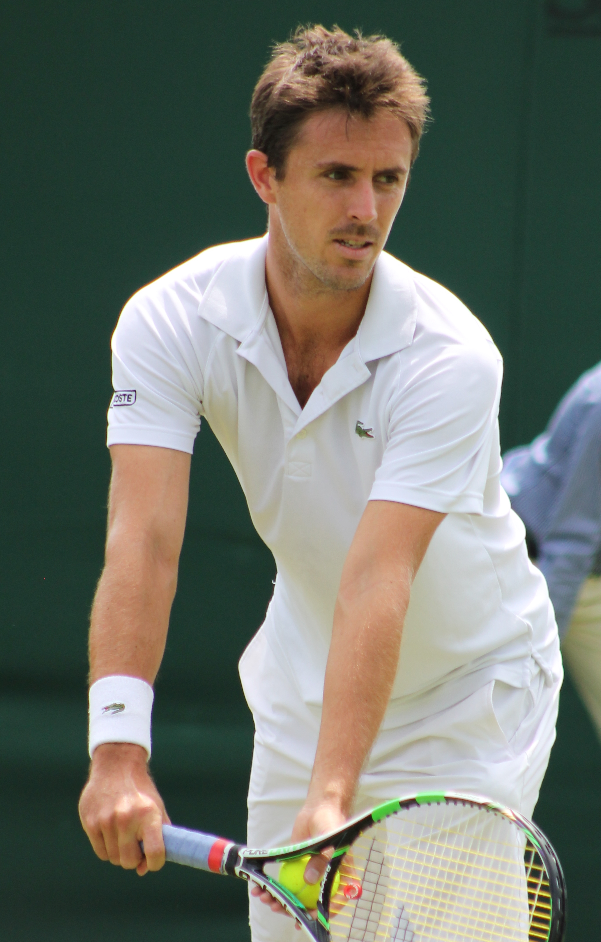 Roger-Vasselin WM14 (4)